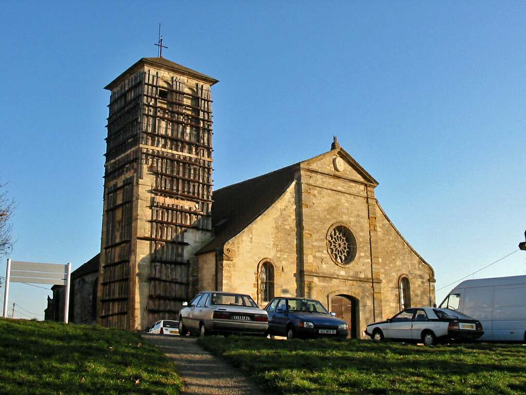 Église de meulan (Yvelines) Photo JH Mora, janvier 2006